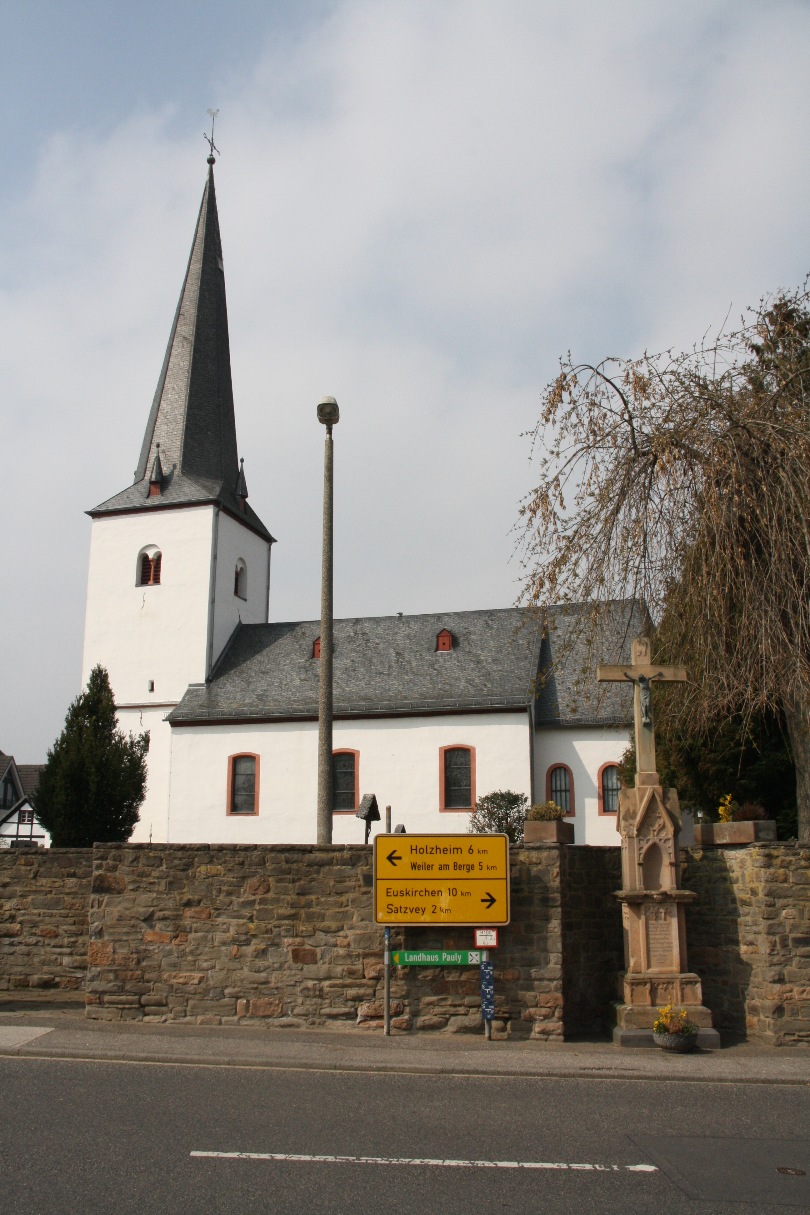 Lessenich Ort by Niederkasseler